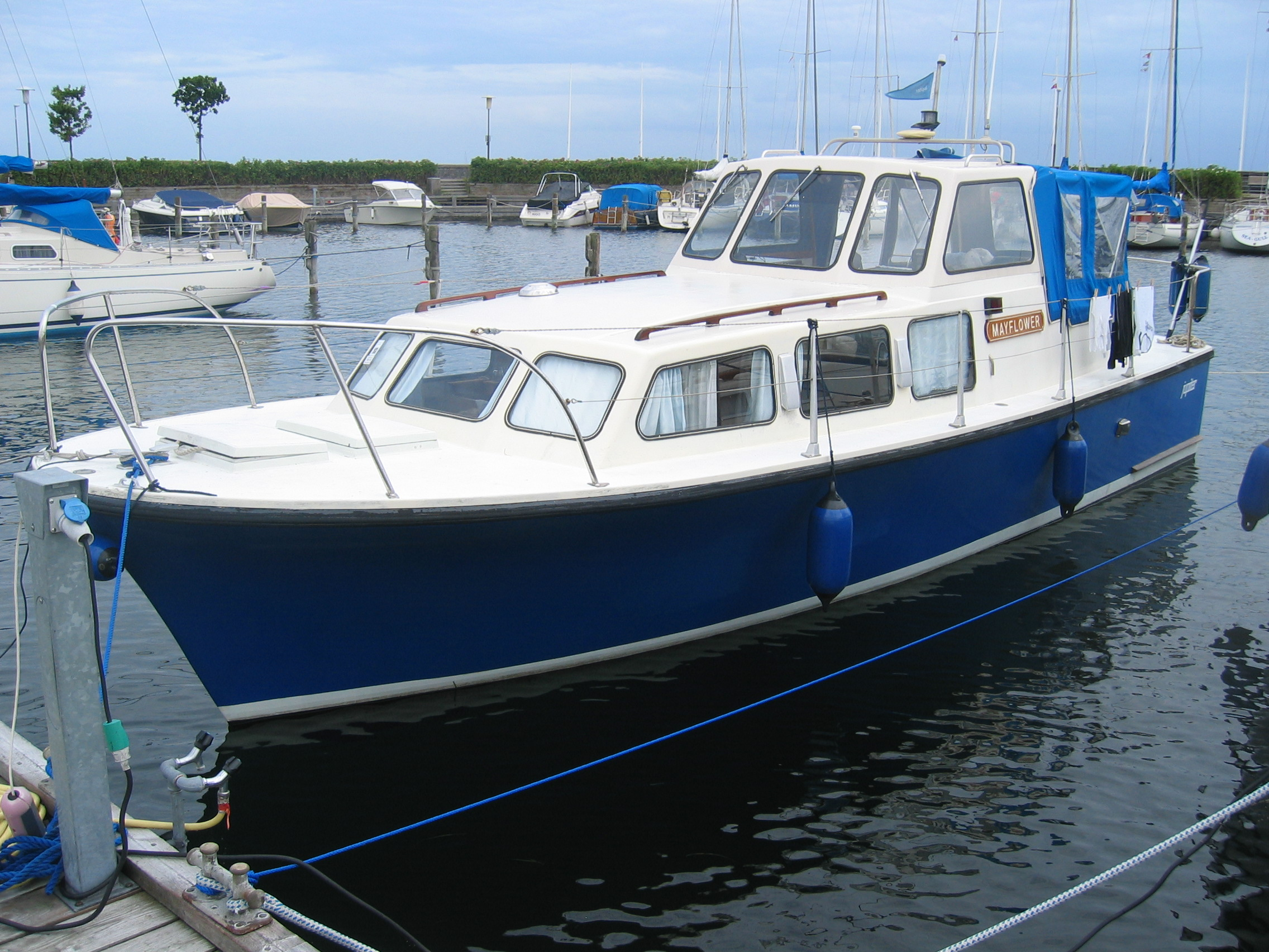 Billedet forestiller Jupiter 30 Jeg har selv taget billedet.